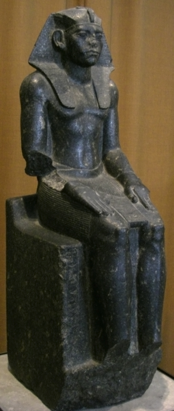 Статуя фараона Аменемхета III. Порфир, XIX в. до н.э. Эрмитаж, Санкт-Петербург, Россия.